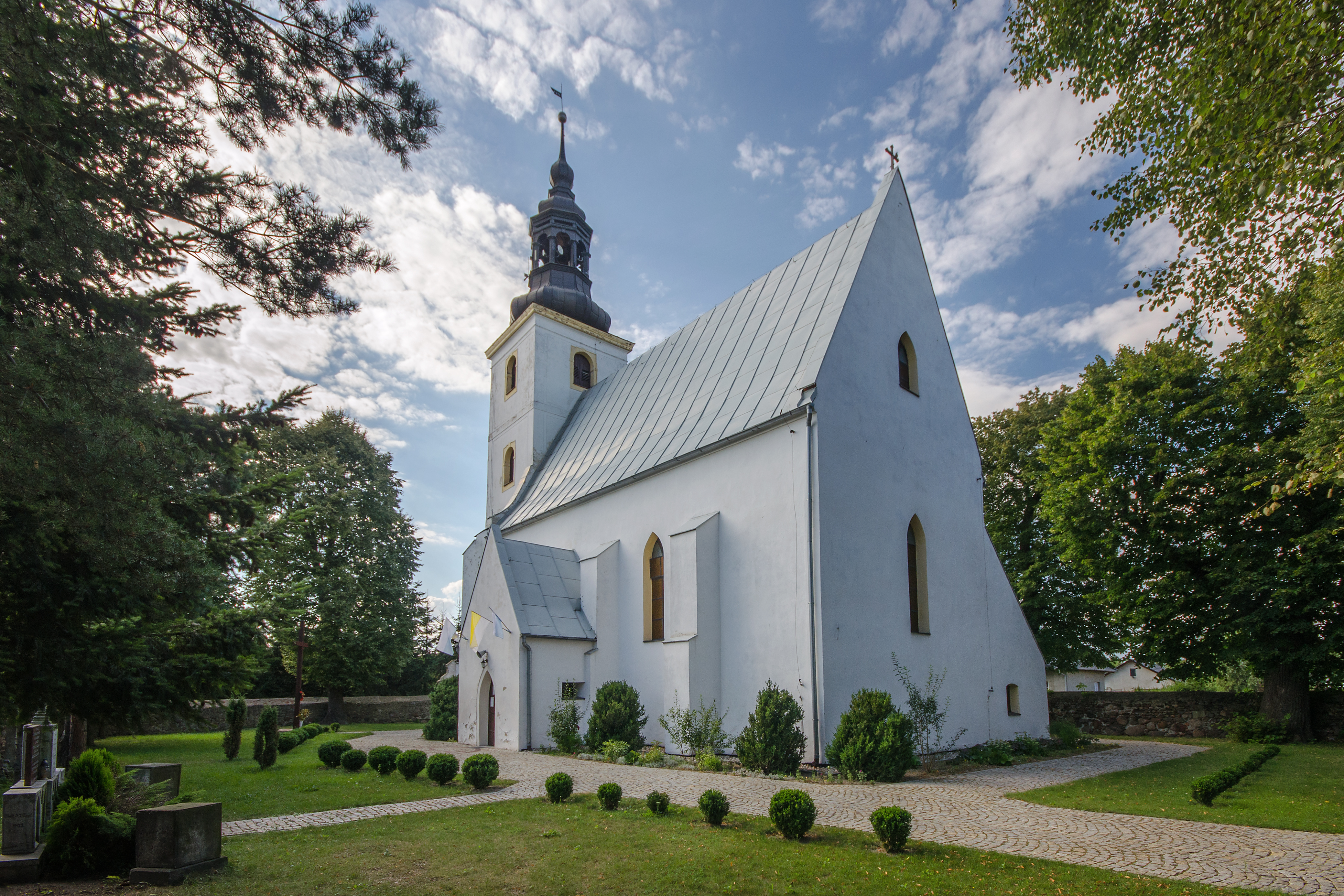 Łukowice Brzeskie, kościół ewangelicki, 1581, 1697, 1723